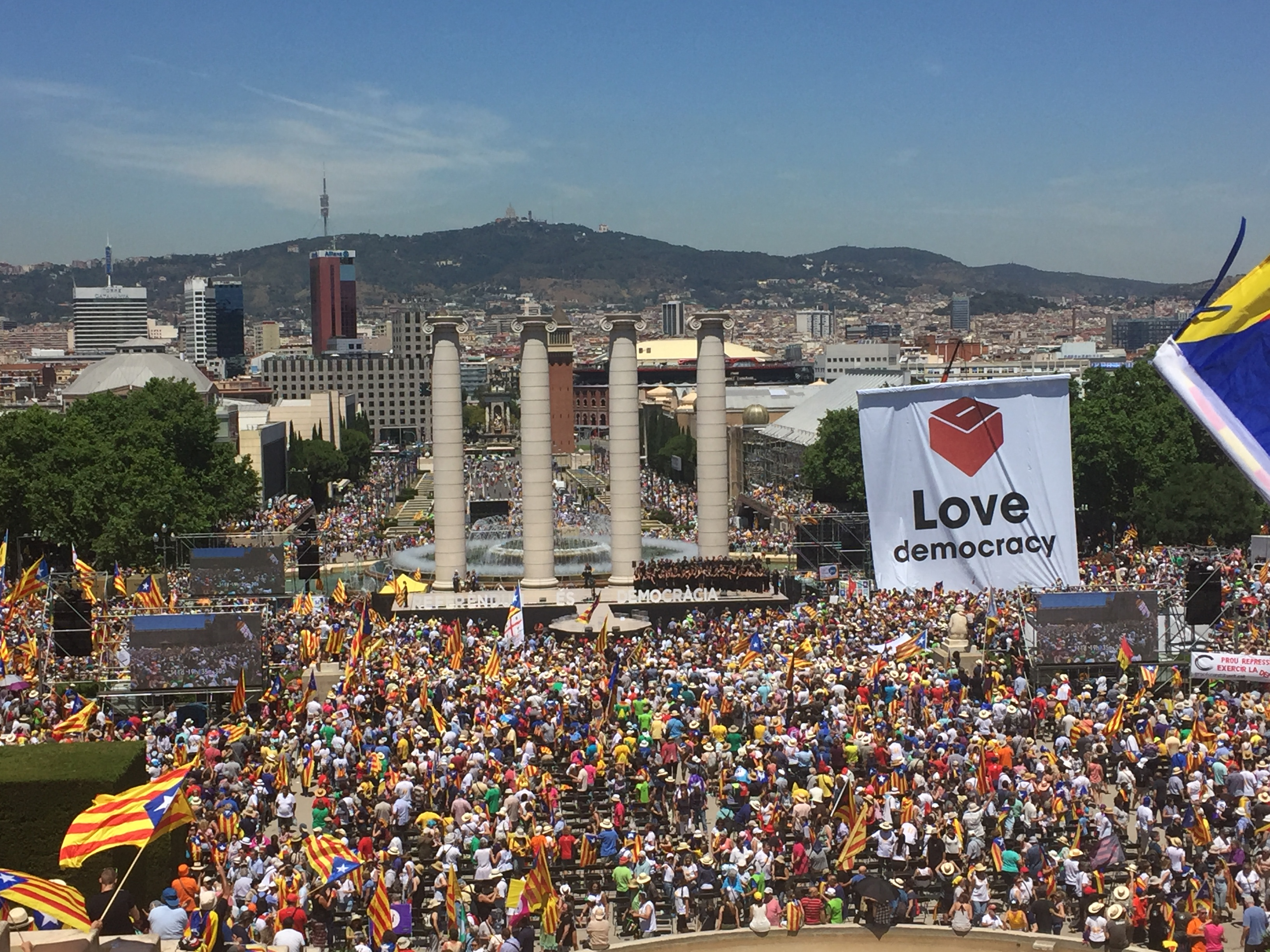 acte pro referèndum celebrat a Montjuïc l'11 de juny de 2017 després que el president Puigdemont, el Govern i els diputats independentistes anunciessin la data i la pregunta del referèndum per l'1 d'octubre de 2017